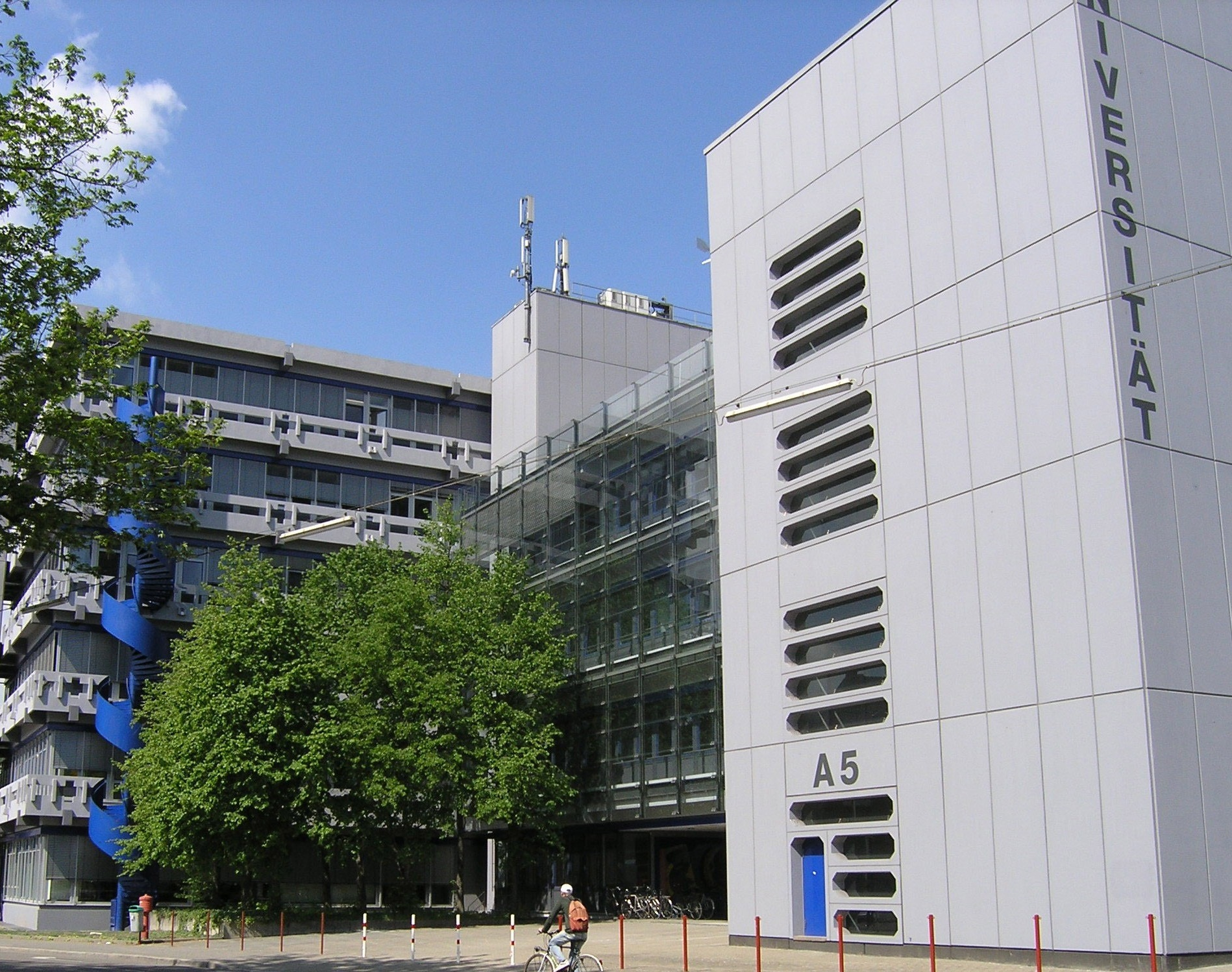 Universitätsgebäude A5 der Universität Mannheim - Department der Sozialwissenschaften